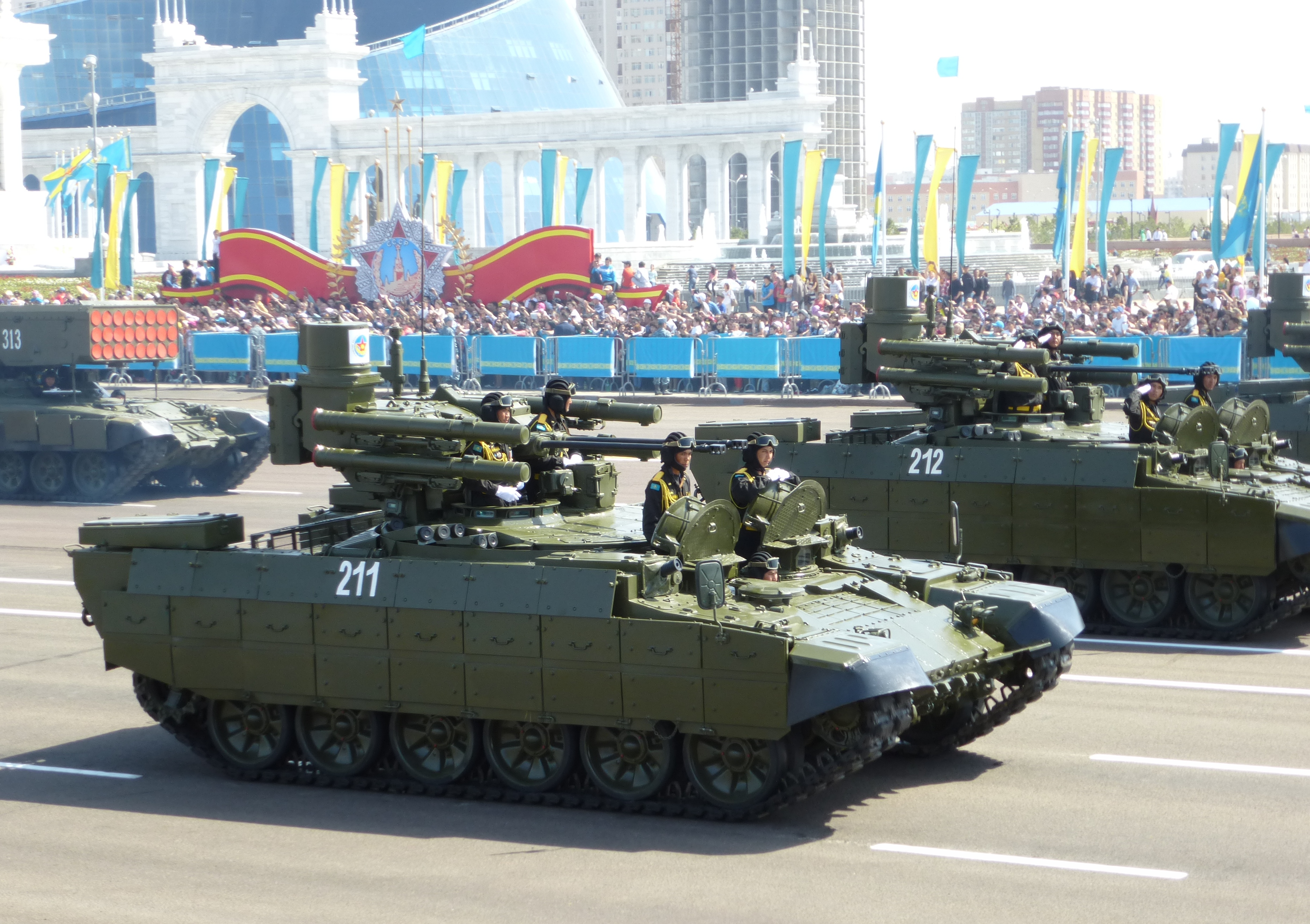 БМПТ "Рамка" на военном параде в г.Нур-Султан 7 мая 2015 года